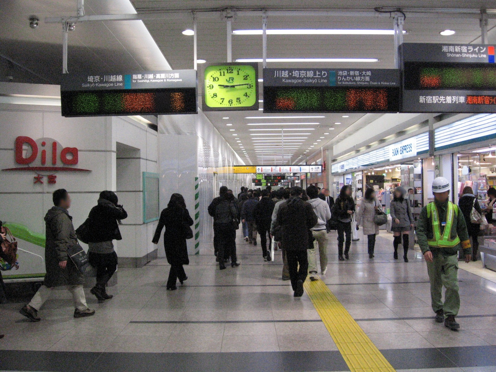 Dila Omiya